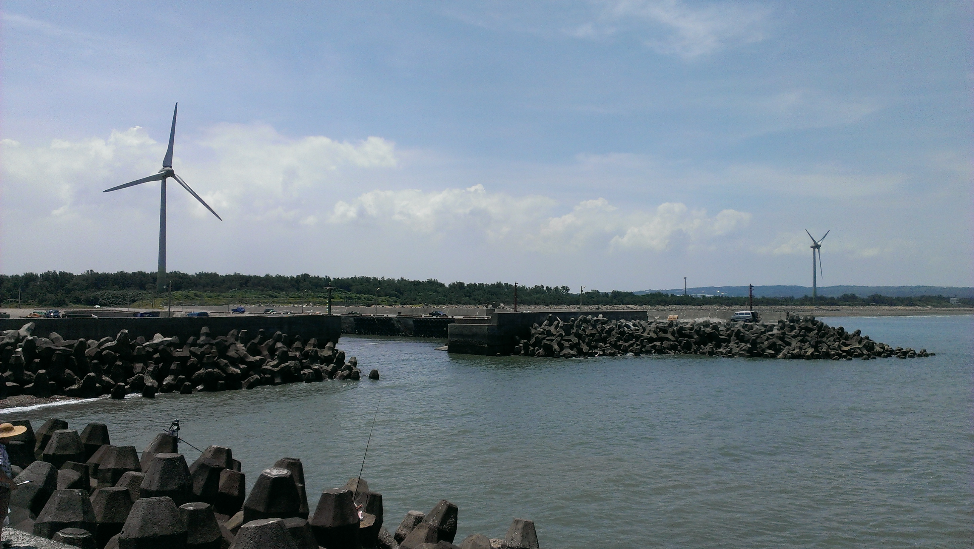 中文（台灣）: 坡頭漁港出海口一景